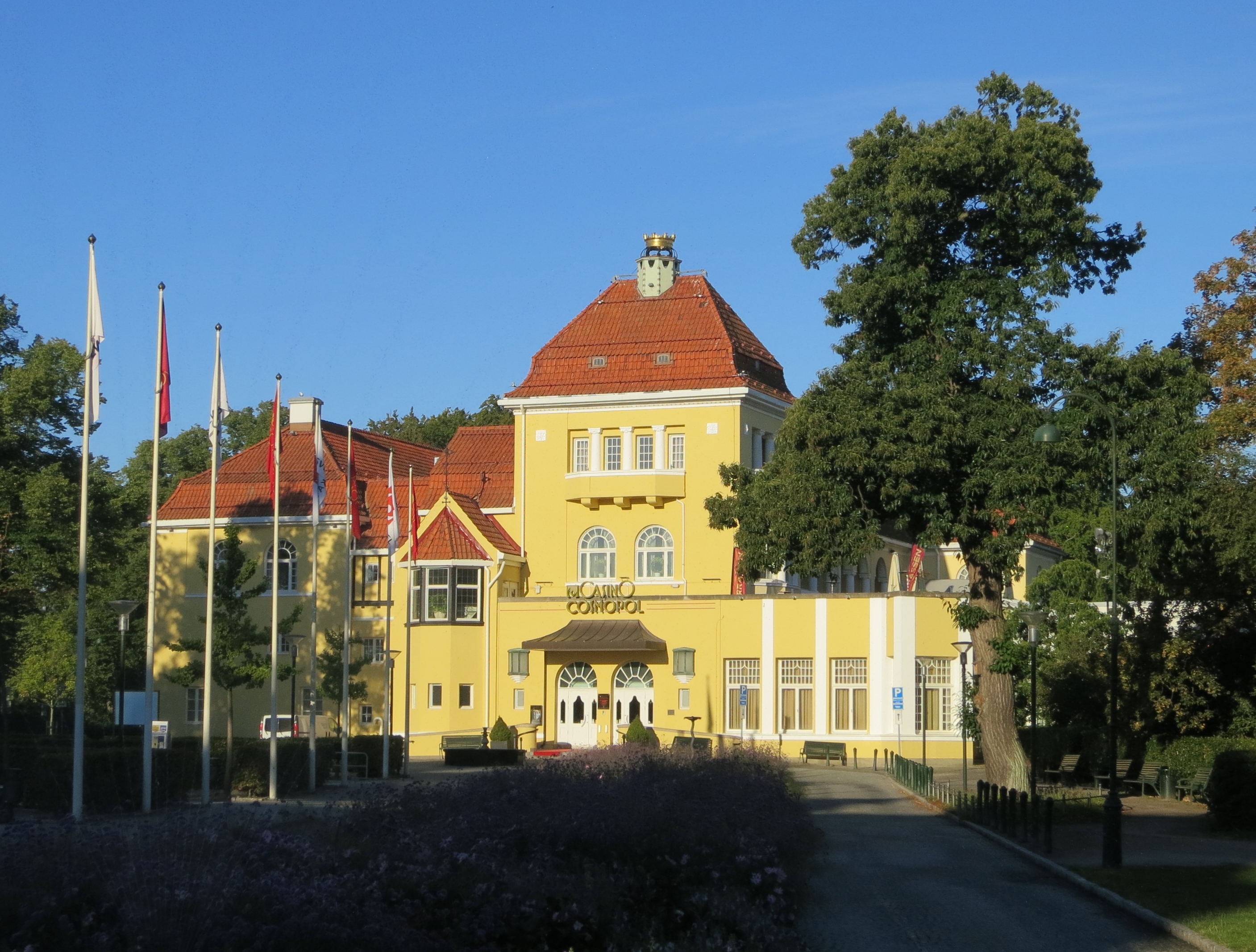 Casino Cosmopol, Malmö. Byggnadsår 1914. Arkitekter Ewe & Melin